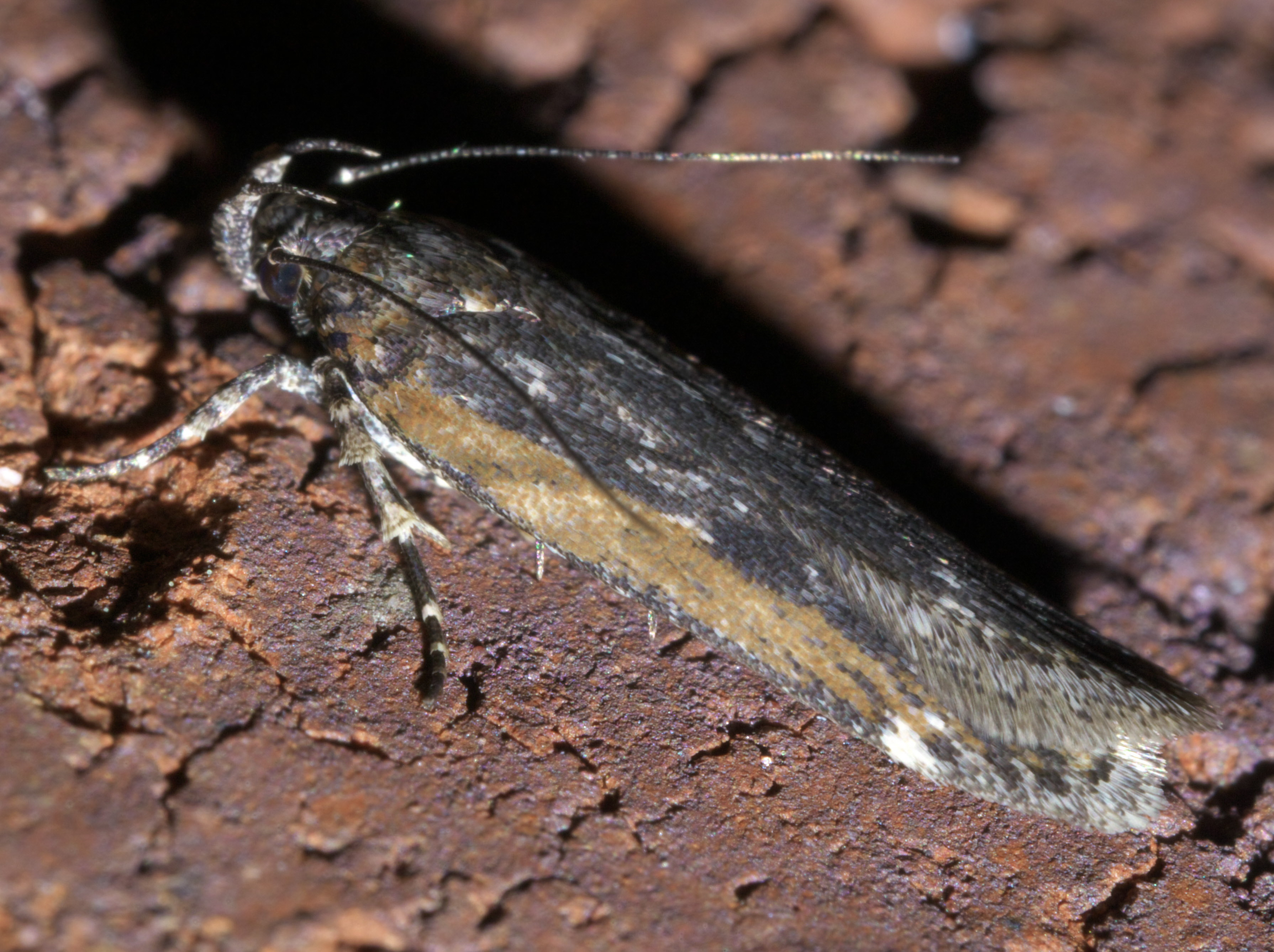 Filatima pseudacaciella, dusky-backed filatima, Size: 11.6 mm, ID Confidence: 88